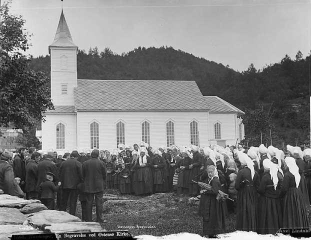 Gravferd ved Øystese kyrkje